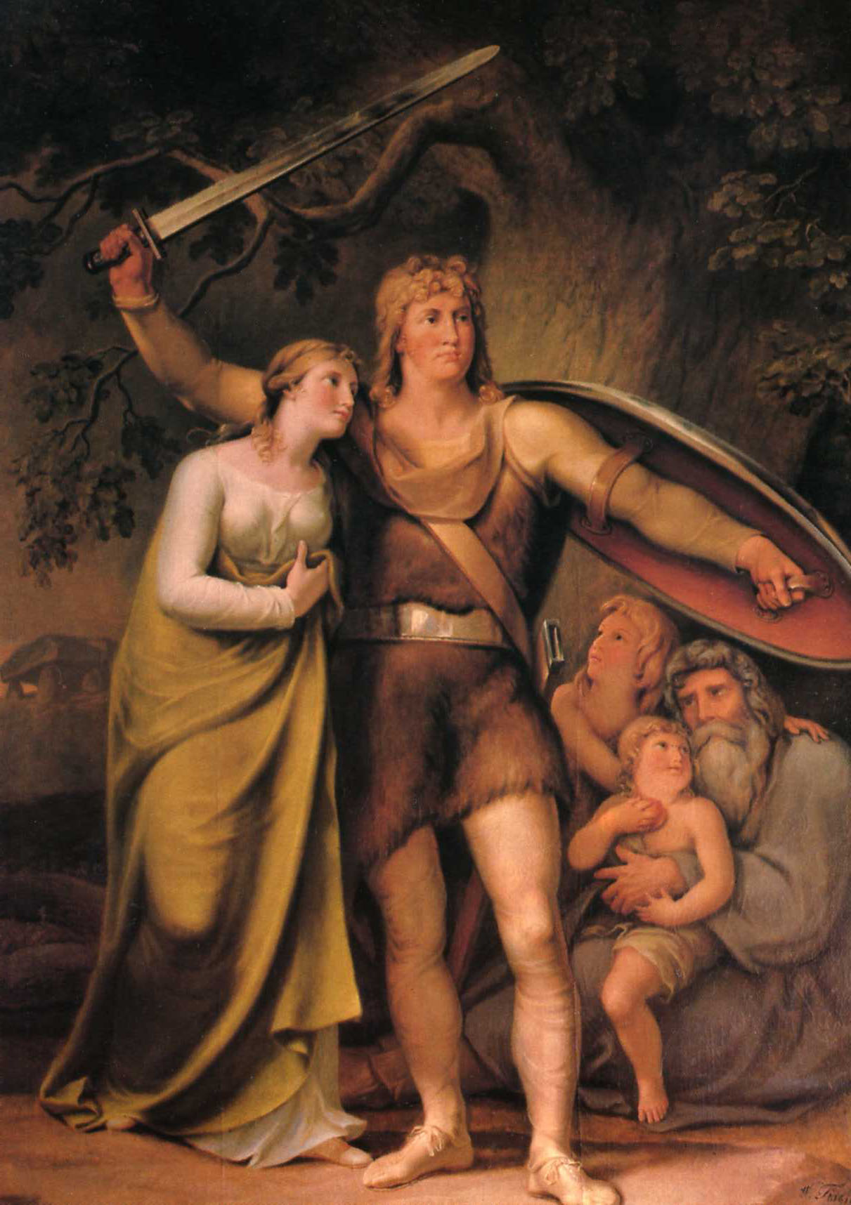 Hermann und Thusnelda von Johann Heinrich Wilhelm Tischbein (1822)